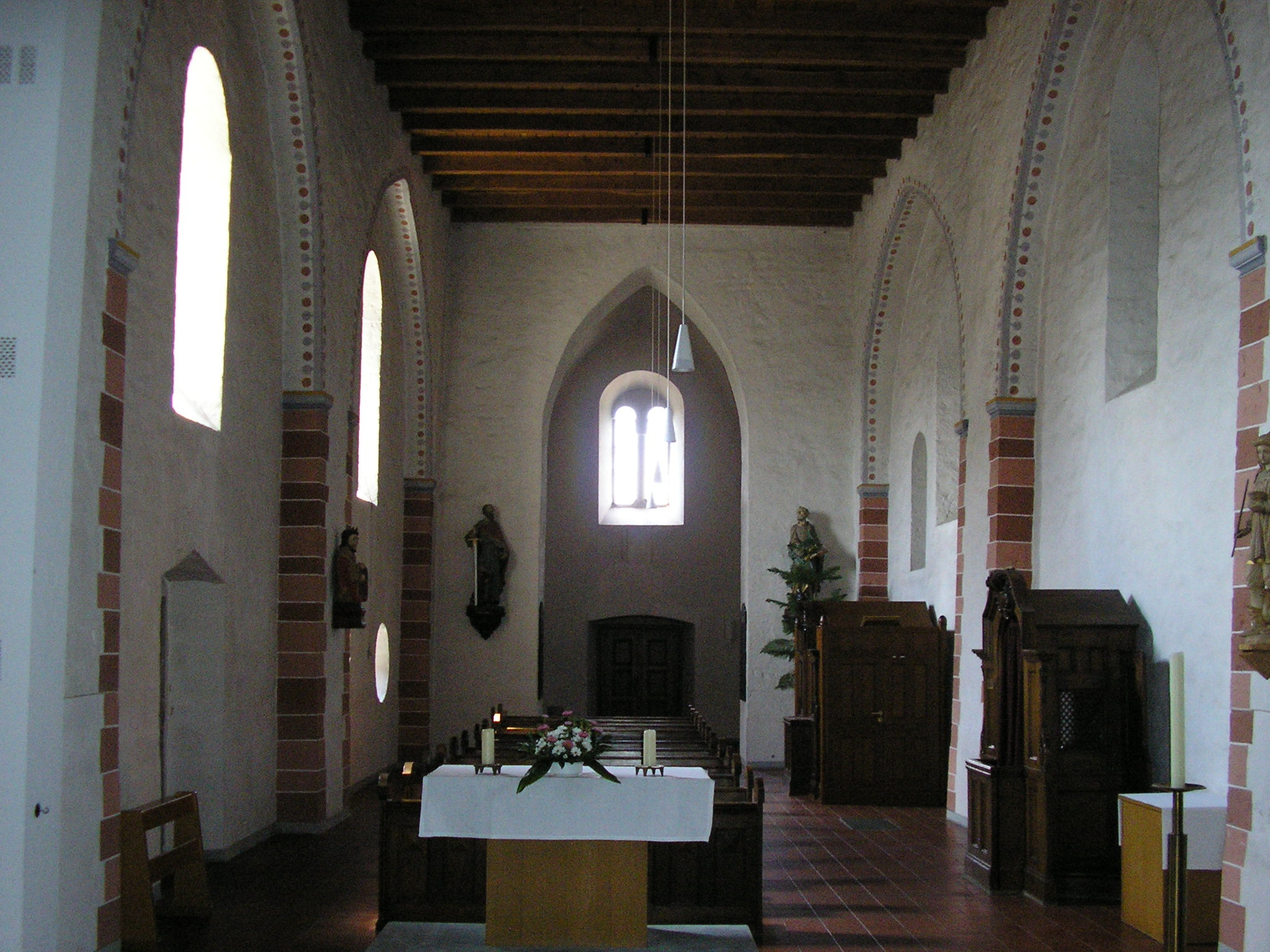 St. Vitus zu Lette